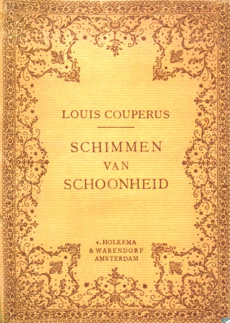 Schimmen van schoonheid